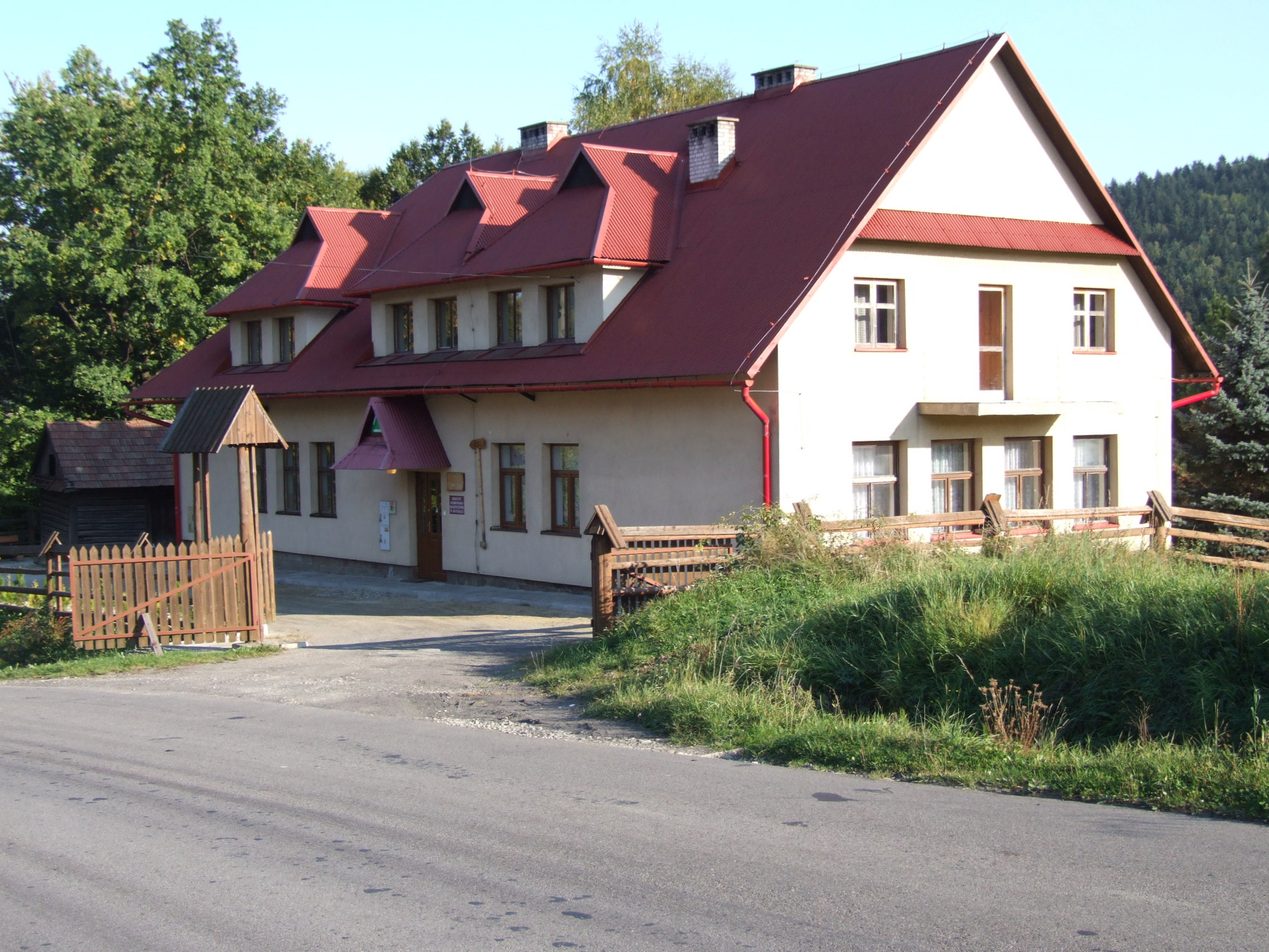 Schronisko Młodzieżowe w Rozdzielu